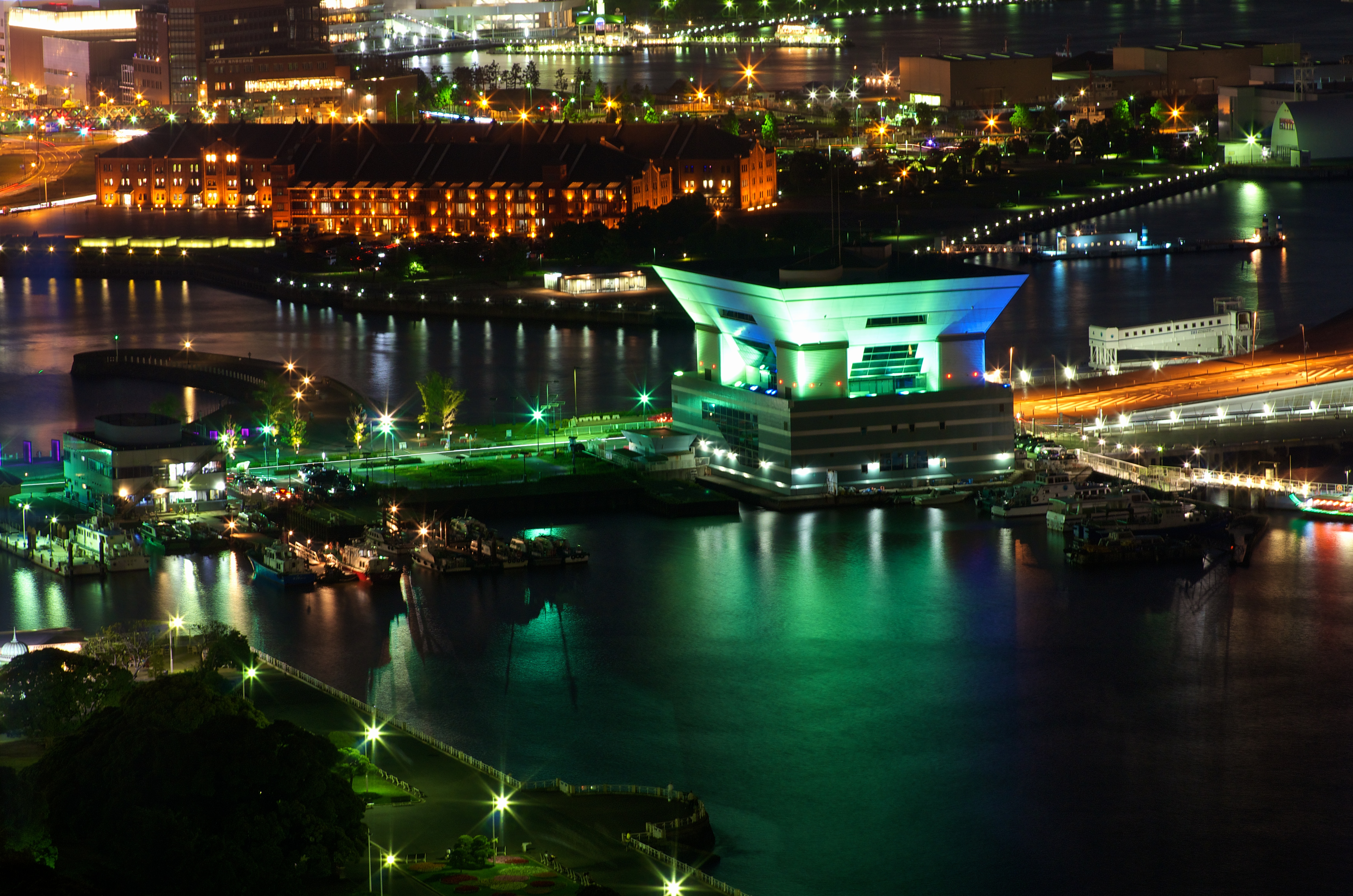 Yokohama Port